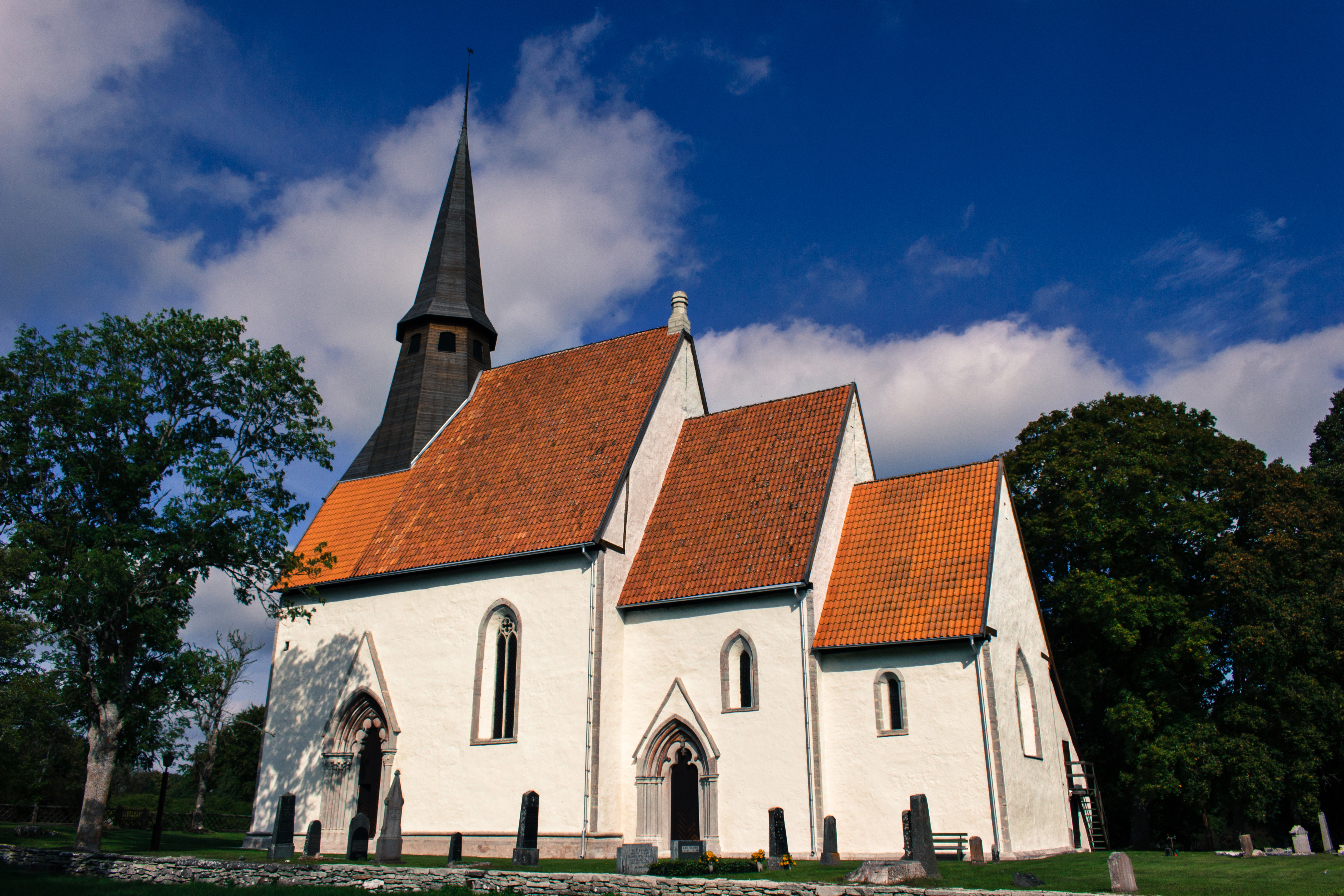 Igrexa de Kräklingbo, na illa sueca de Gotland.